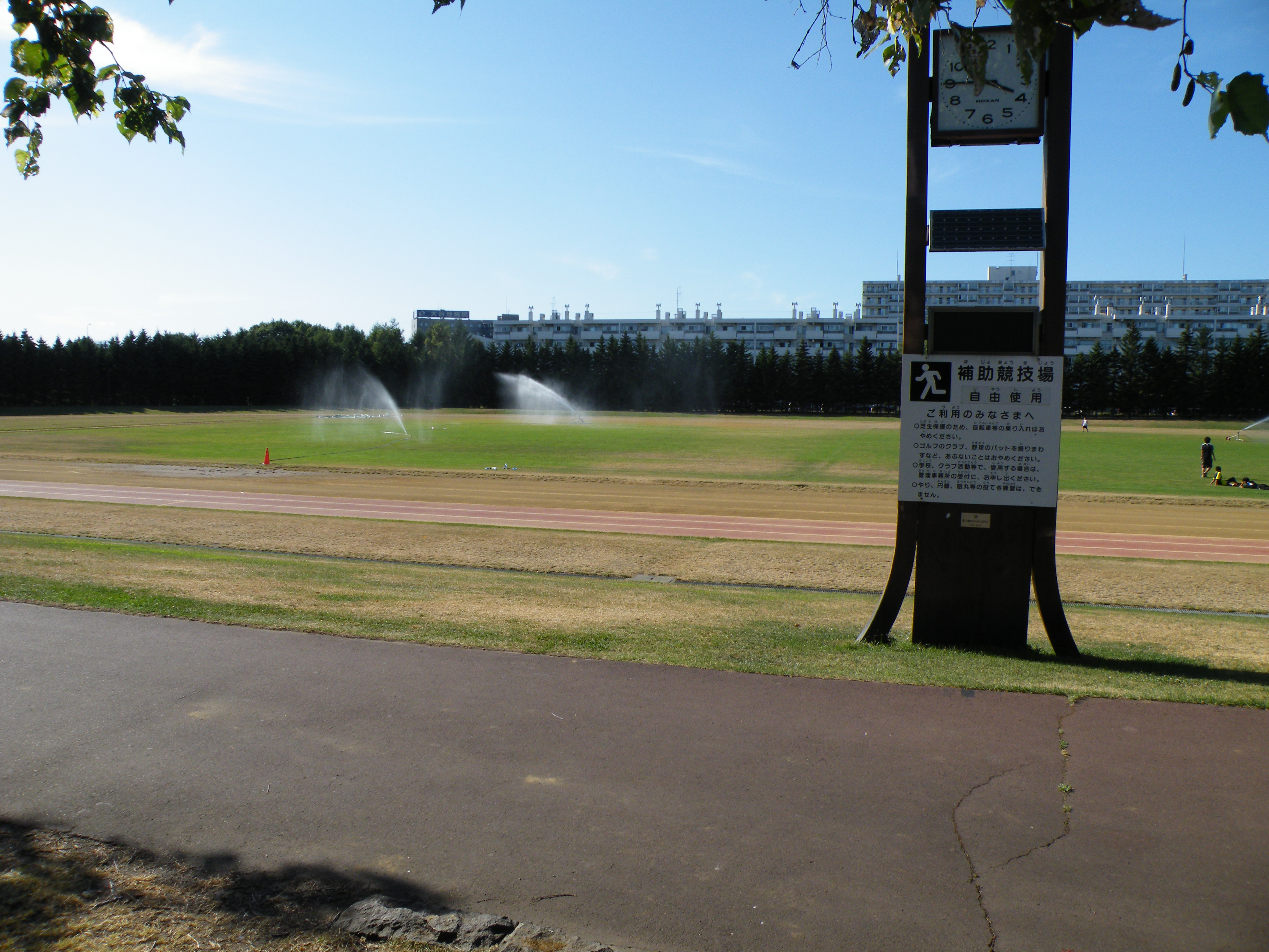 札幌厚別公園競技場 補助競技場